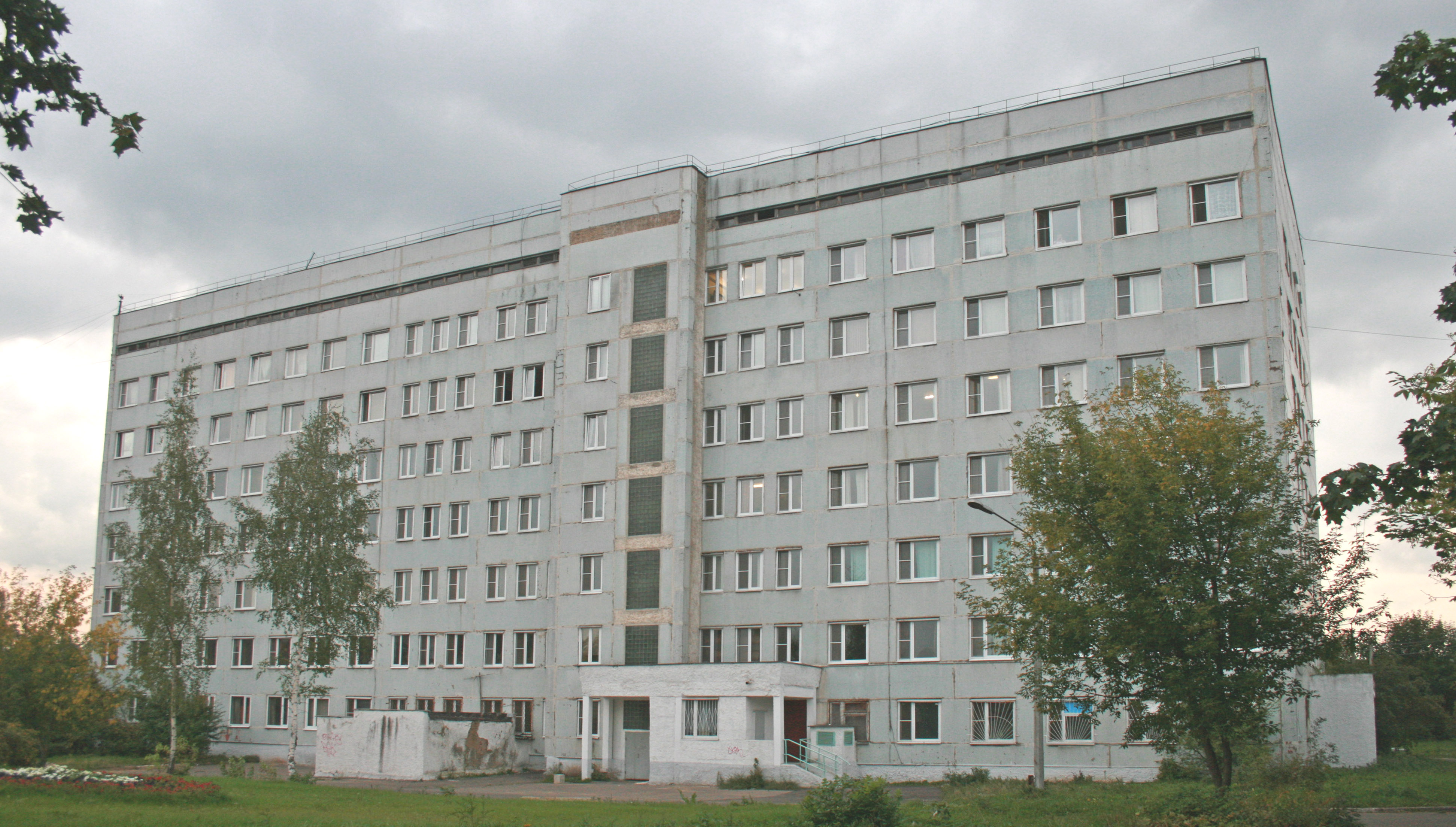 Ивантеевская центральная городская больница, хирургический корпус.